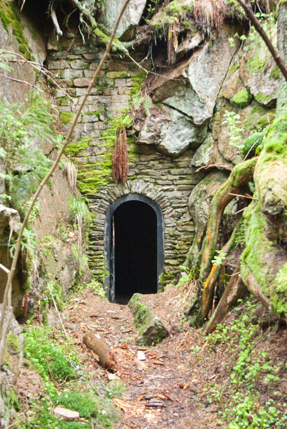 Potůčky, Krušné hory, Podleská štola (štola Tiefer Streitpingen)